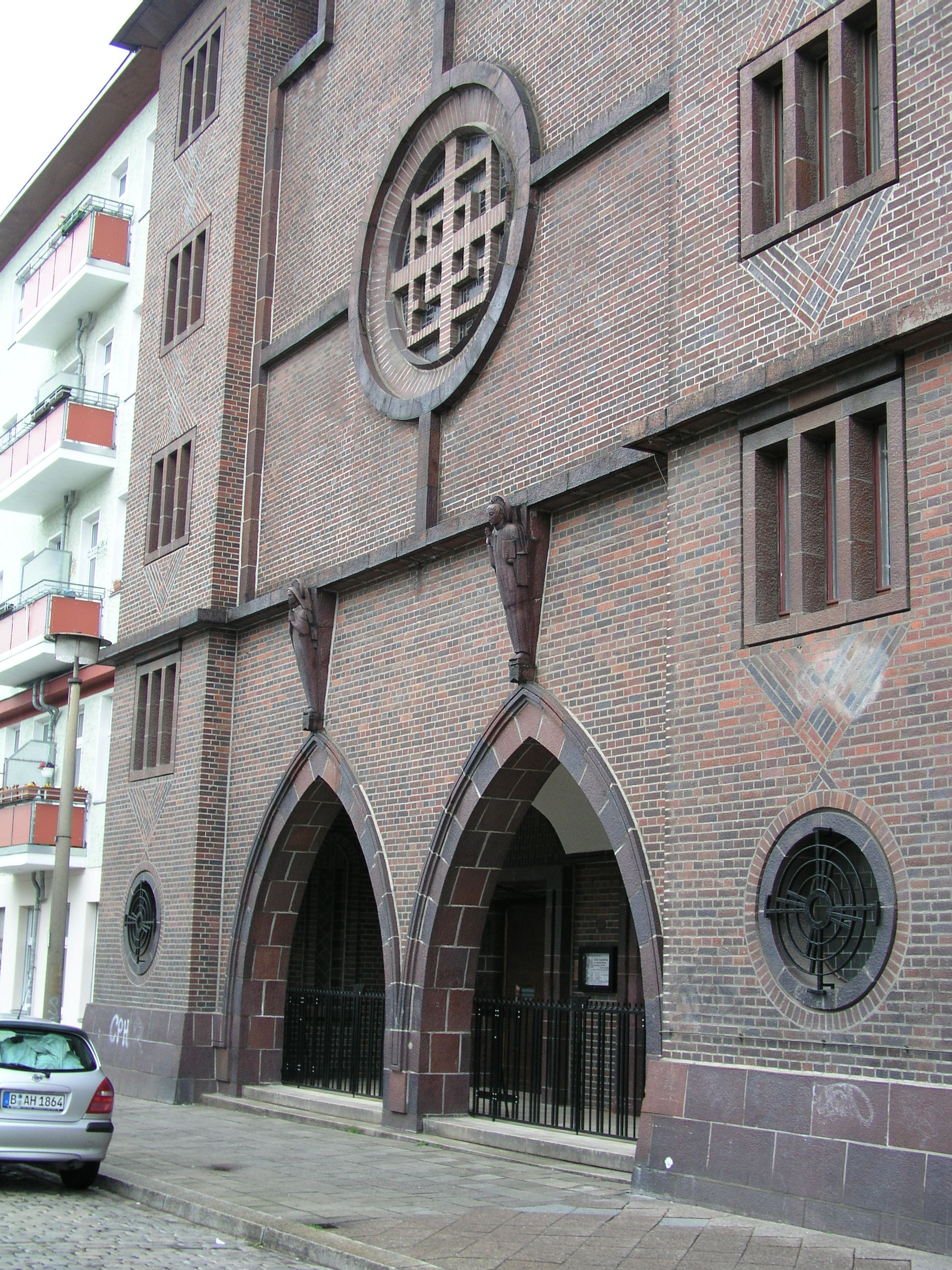 Eingang zur Vorhalle der Kirche St. Augustinus (1)